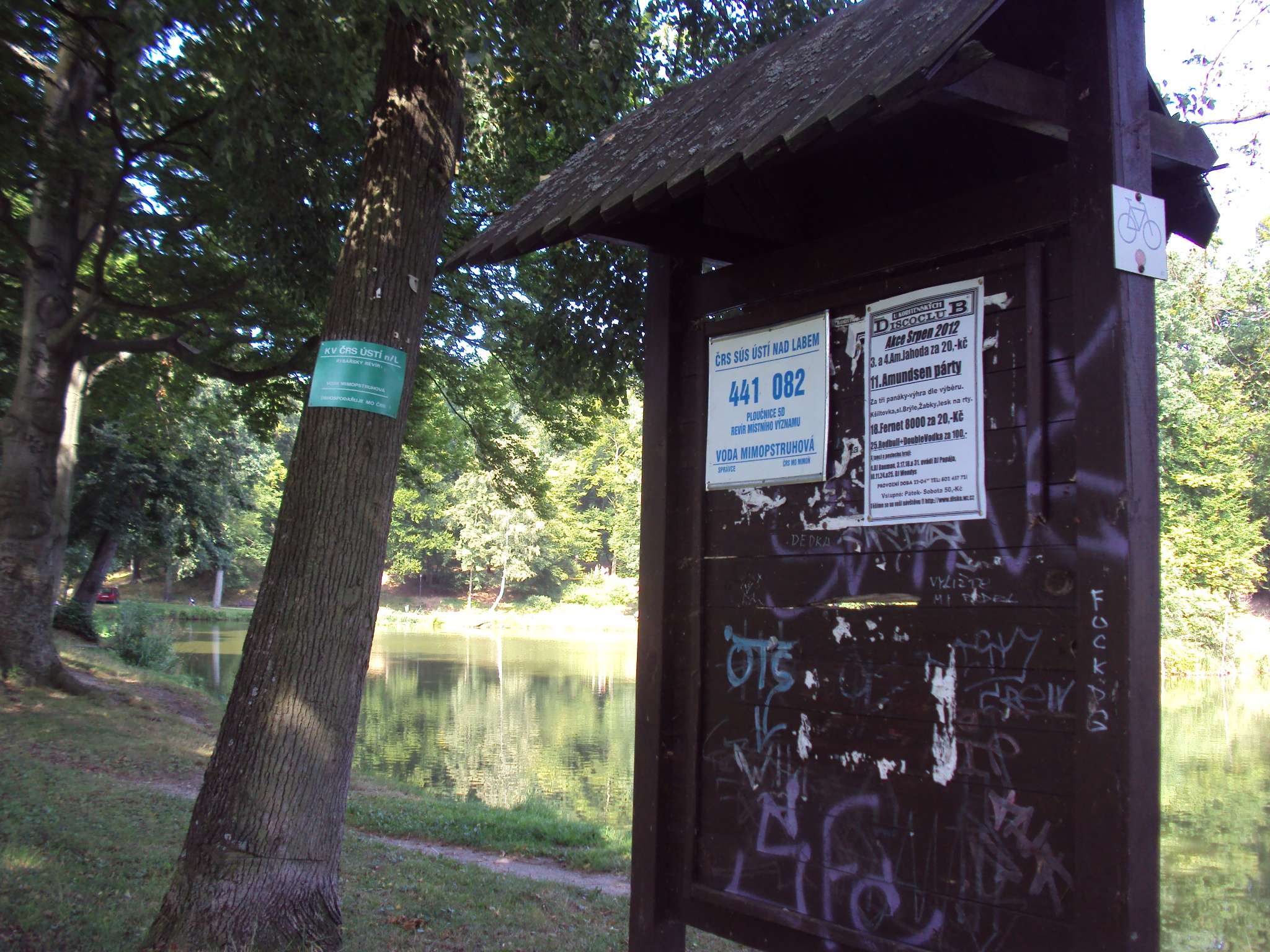 Cedule rybářů u zámeckého rybníka v Mimoni